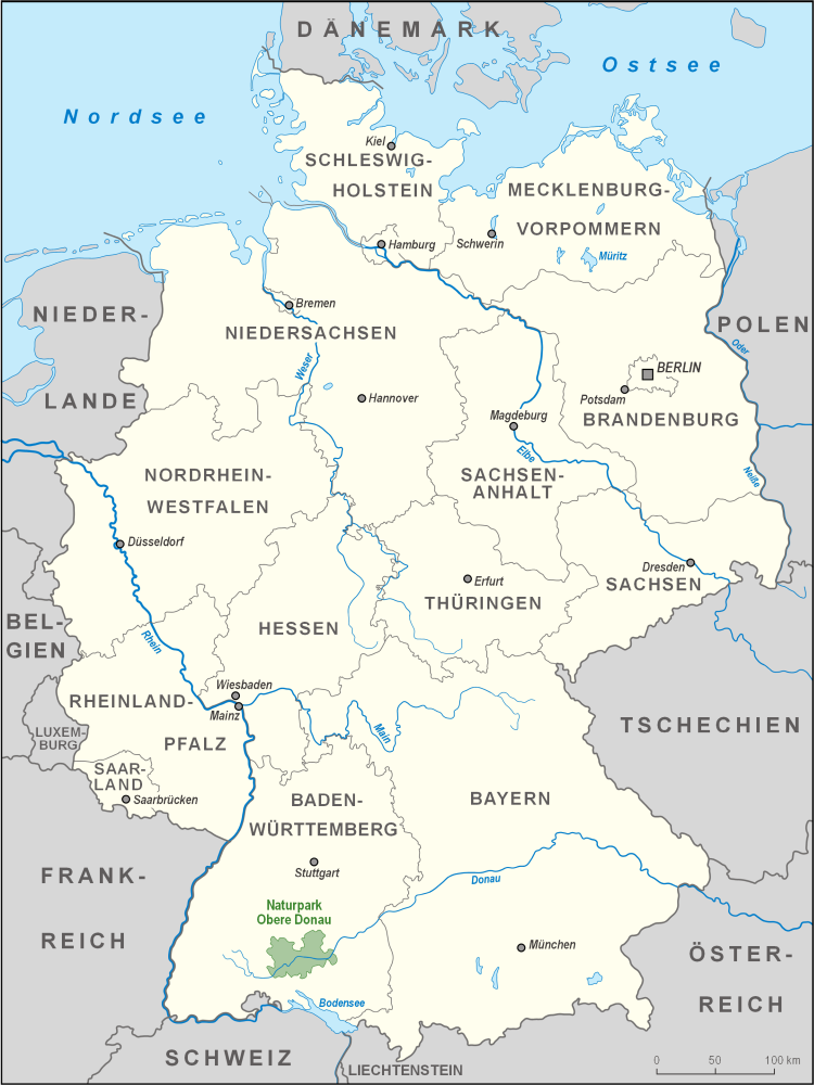 Karte des Naturparks Obere Donau in Deutschland